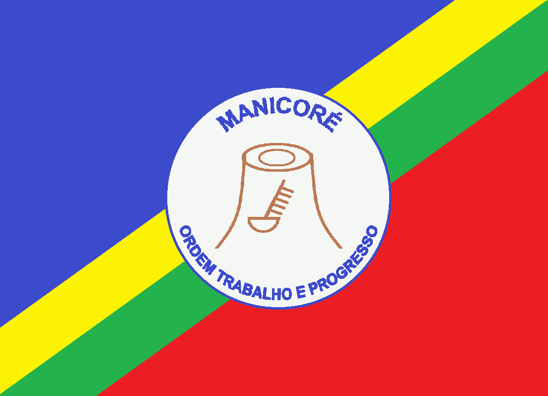 Bandeira do município de Manicoré, Amazonas, Brasil.